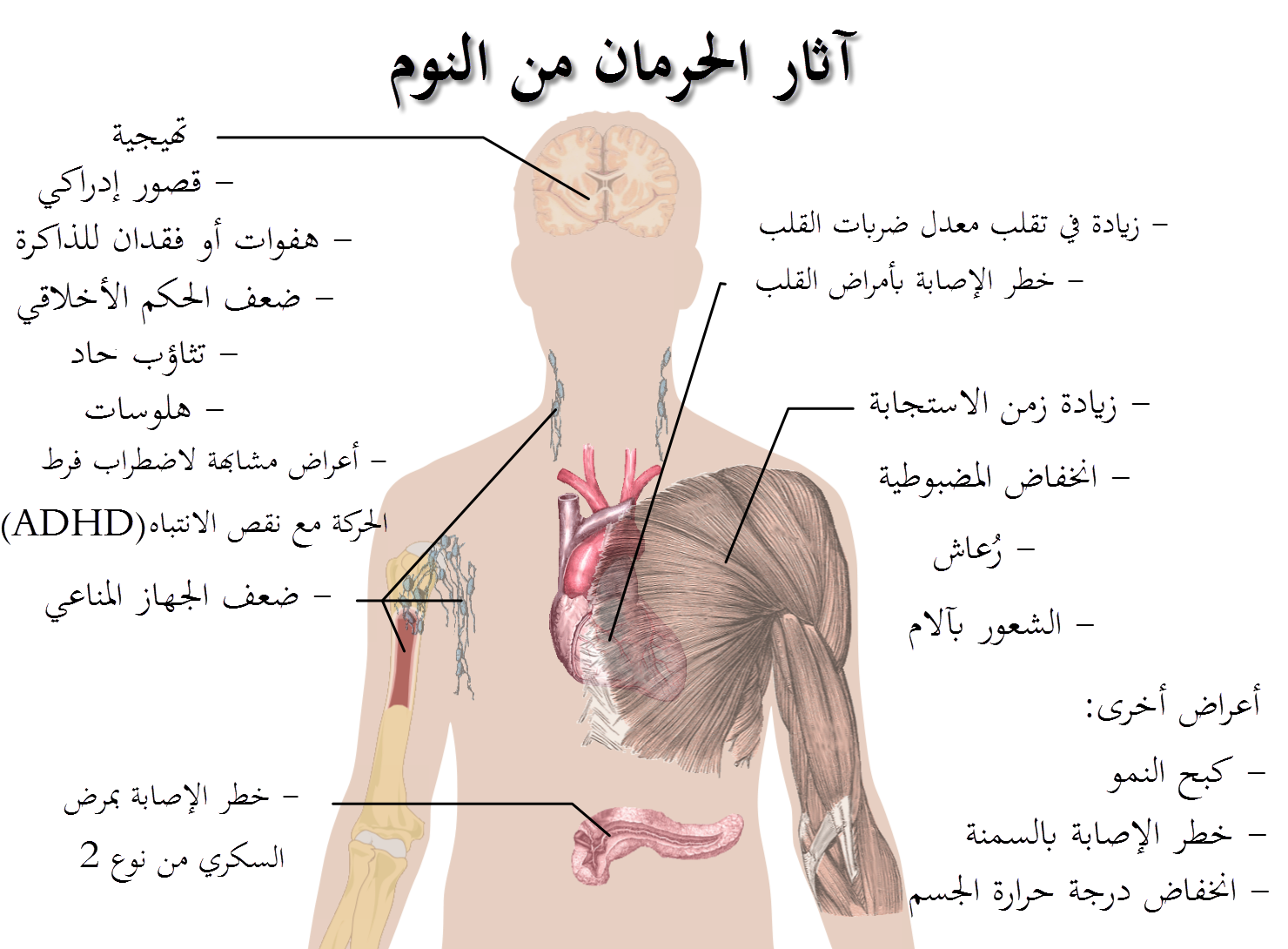 الآثار الصحية الرئيسية للحرمان من النوم. (أنظر حرمان من النوم)